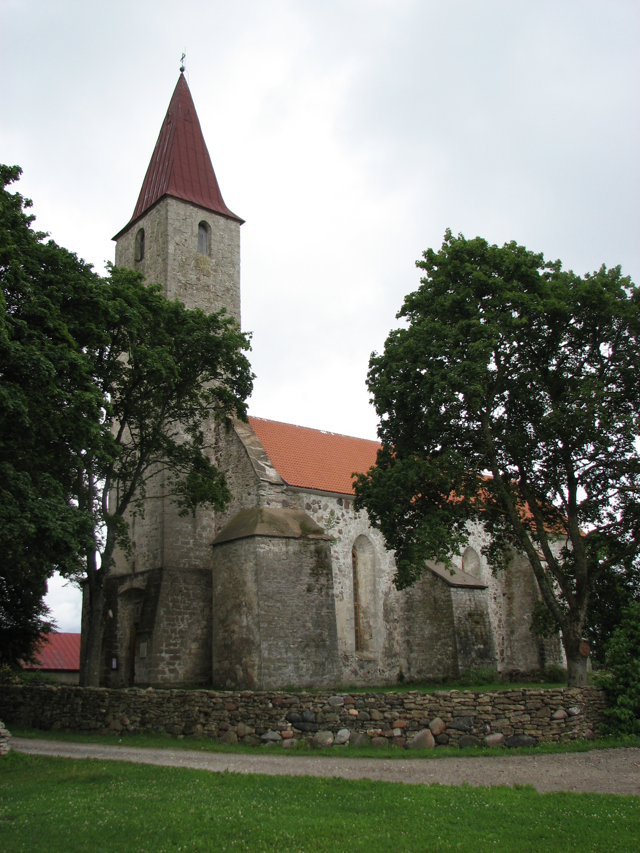 Saint church in Pihtla, Saaremaa, Estonia